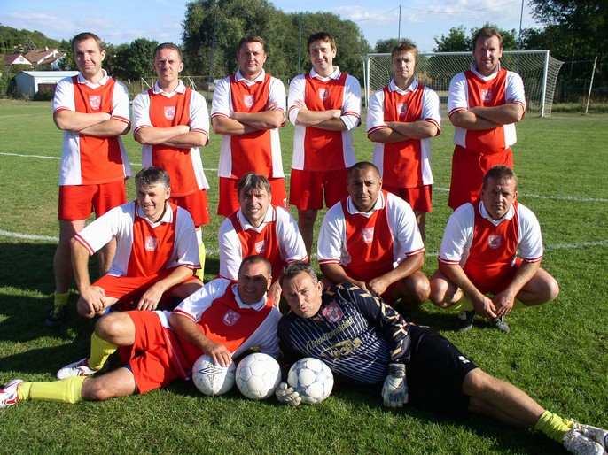 OFK Golianovo